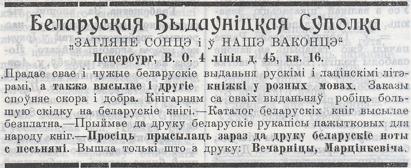 Аб'ява выдавецтва be:Загляне сонца і ў наша аконца